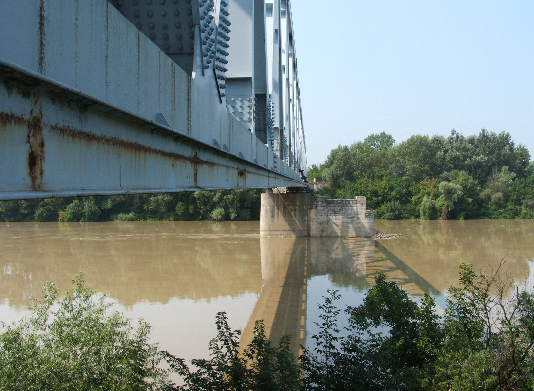 A régi és az új Tisza-híd mederpillérjei Szentes